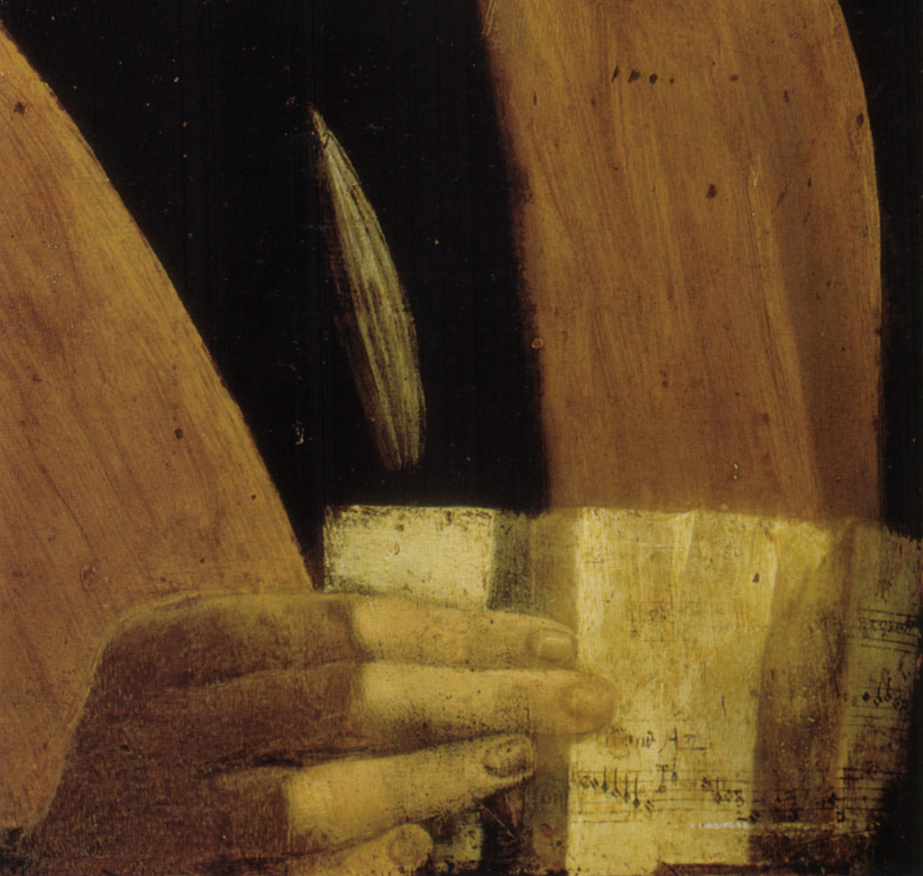 LEONARDO da Vinci Portrait of a Musician Oil on panel, 43 x 31 cm Pinacoteca Ambrosiana, Milan